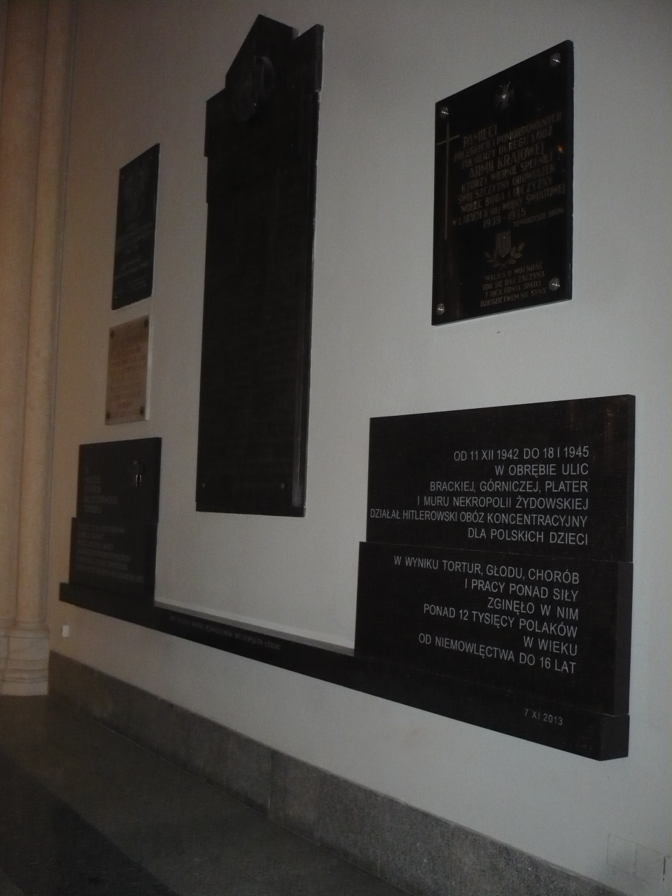 Tablica pamiątkowa w łódzkiej katedrze poświęcona dzieciom i ofiarom obozu przy ul. Przemysłowej w Łodzi z mylną ilością ofiar. Odsłonięta 7 listopada 2013 roku.